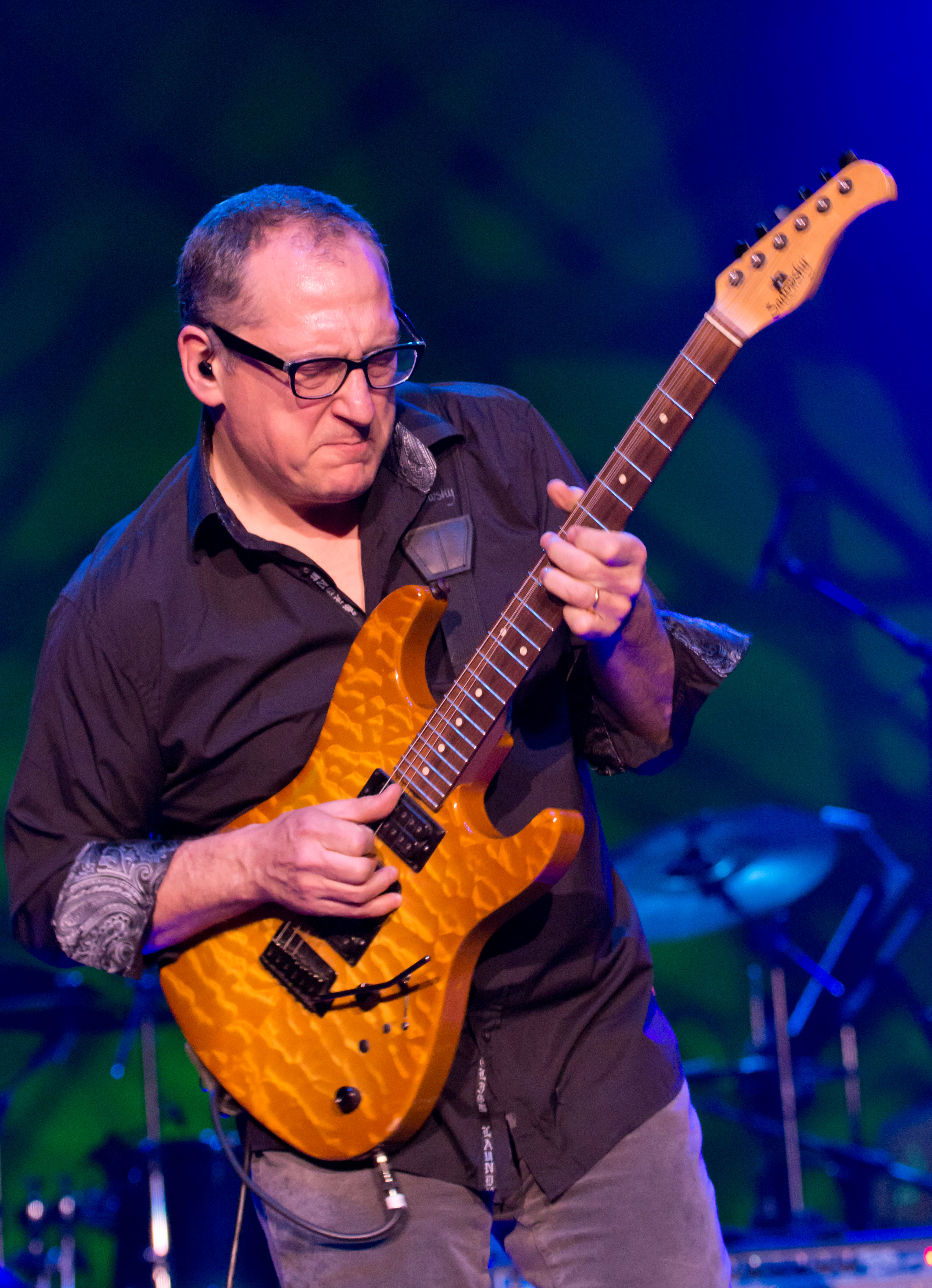 Cuck Loeb en una actuación en Fort Sam Houston Theater, EE.UU.